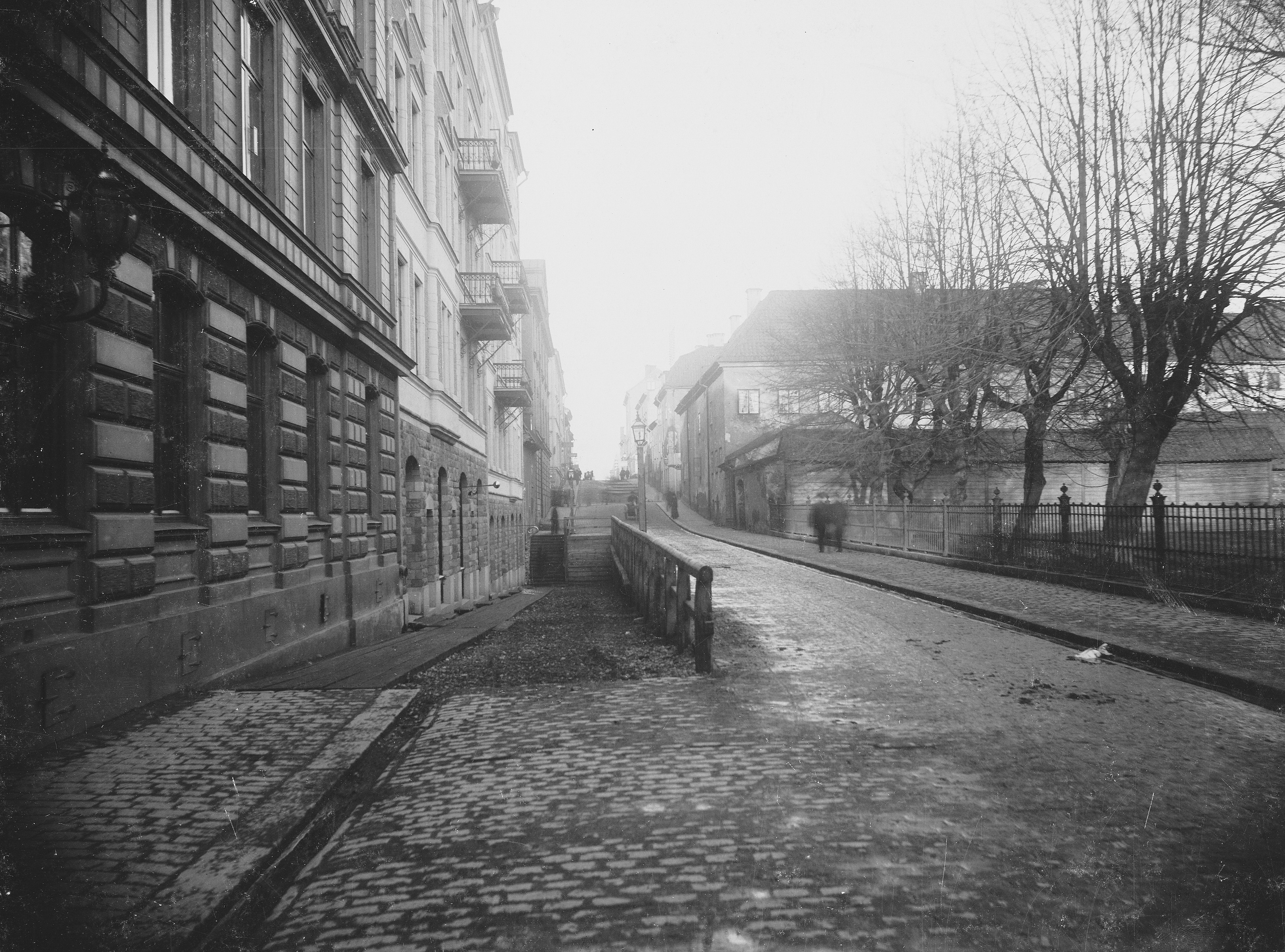 Bellmansgatan mot norr från S.t Paulsgatan, innan Hornsgatan sänktes.